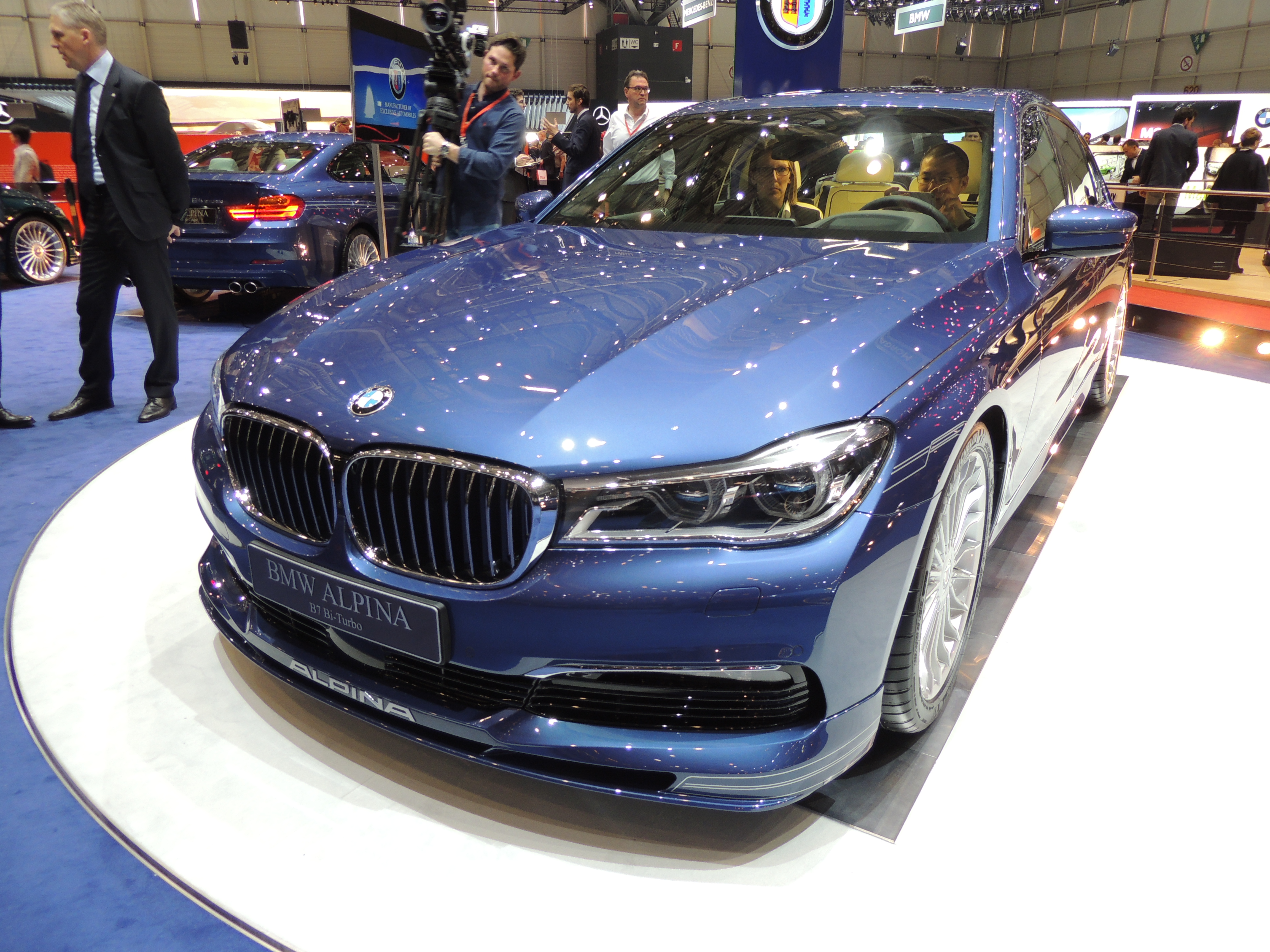 BMW Alpina B7 Bi-Turbo, salon de Genève 2016